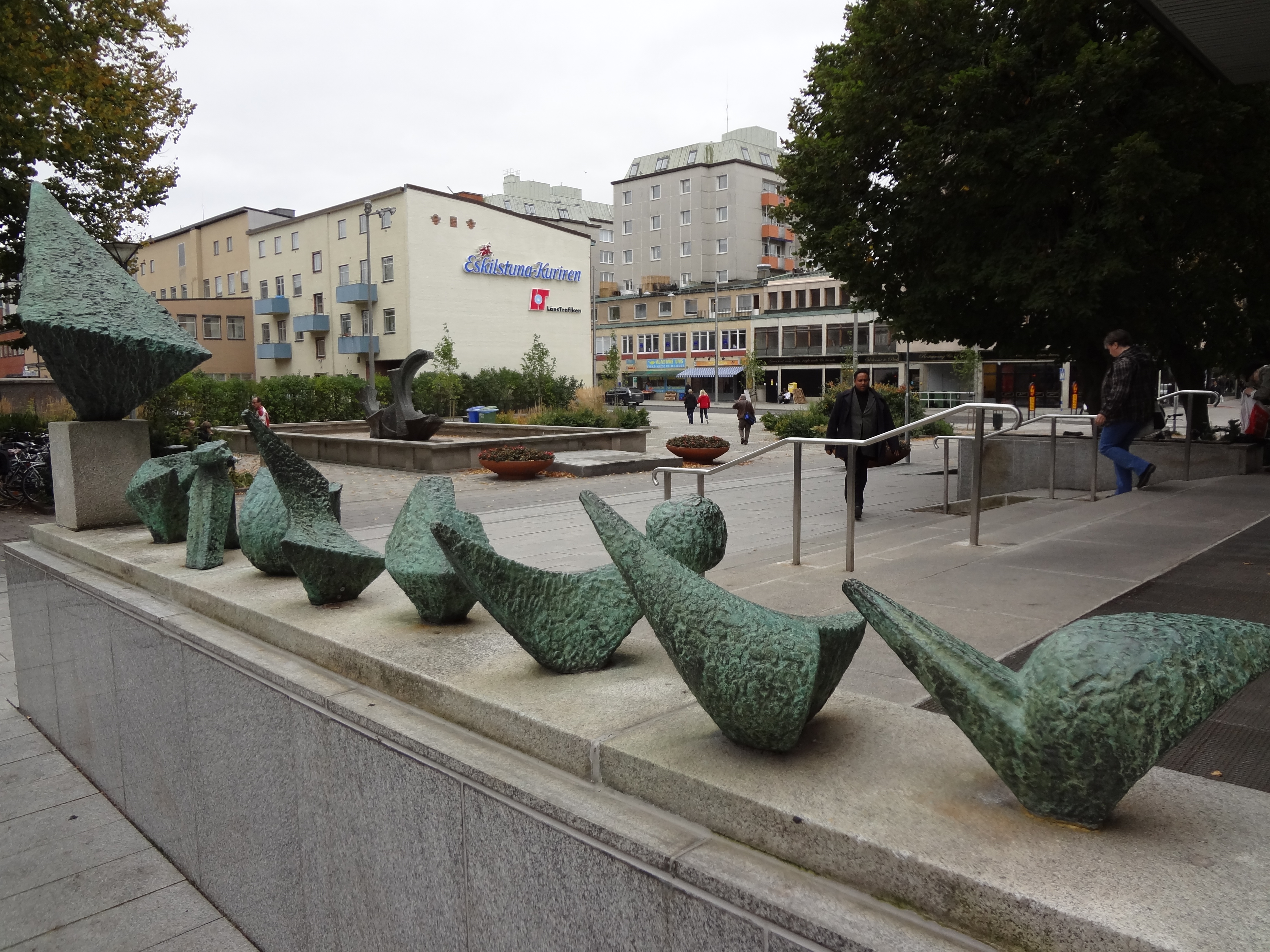 Skulpturen "TEXT", av Bengt Amundin 1965 på trappen till Eskilstuna stadsbibliotek. Text på skylt: "Bengt Amundin, 1915-2011, TEXT, Brons, Uppsatt 1965"